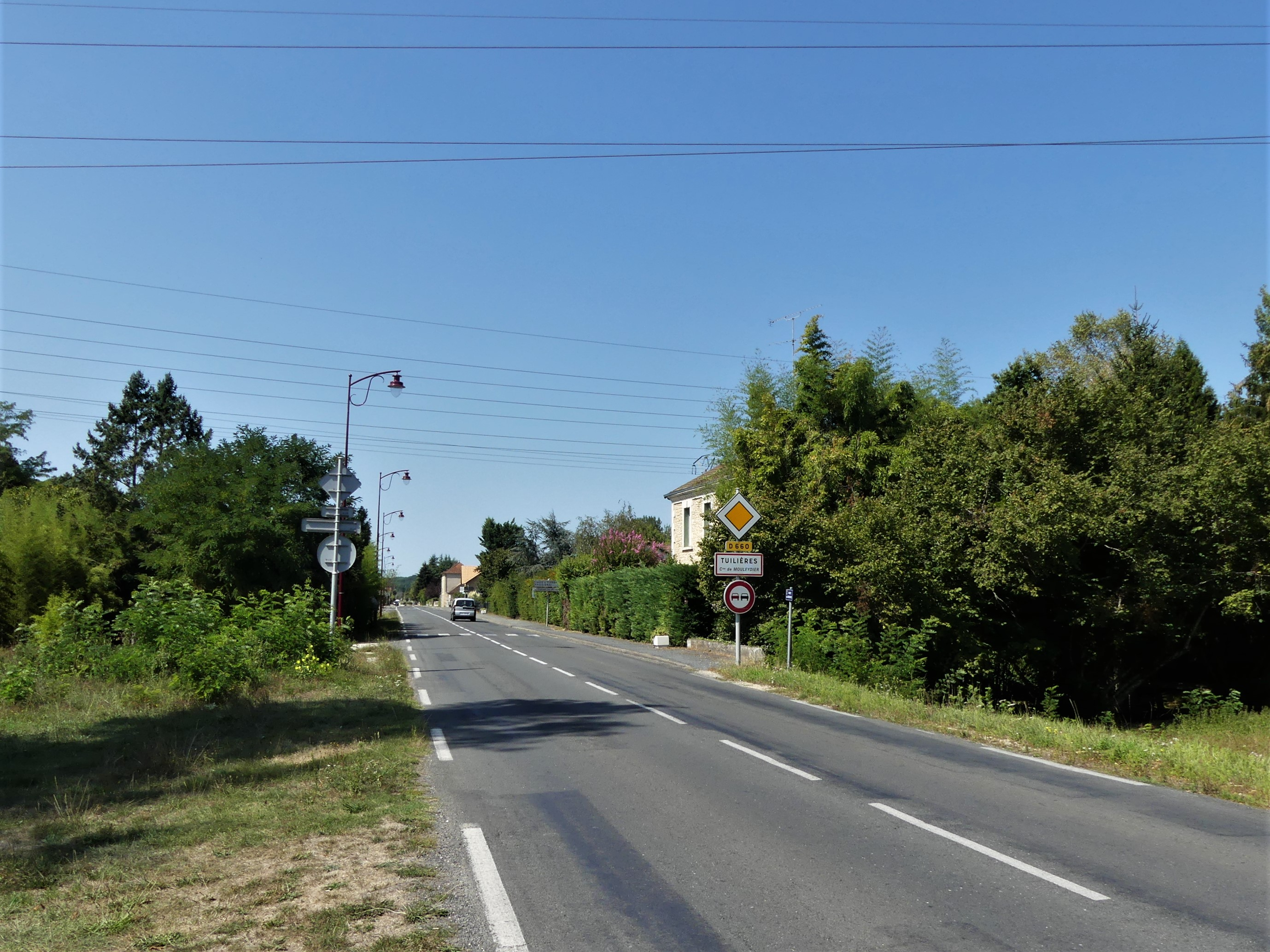 La route départementale 660 à Tuilières, Dordogne, France. Vue prise en direction de l'ouest (commune de Mouleydier).